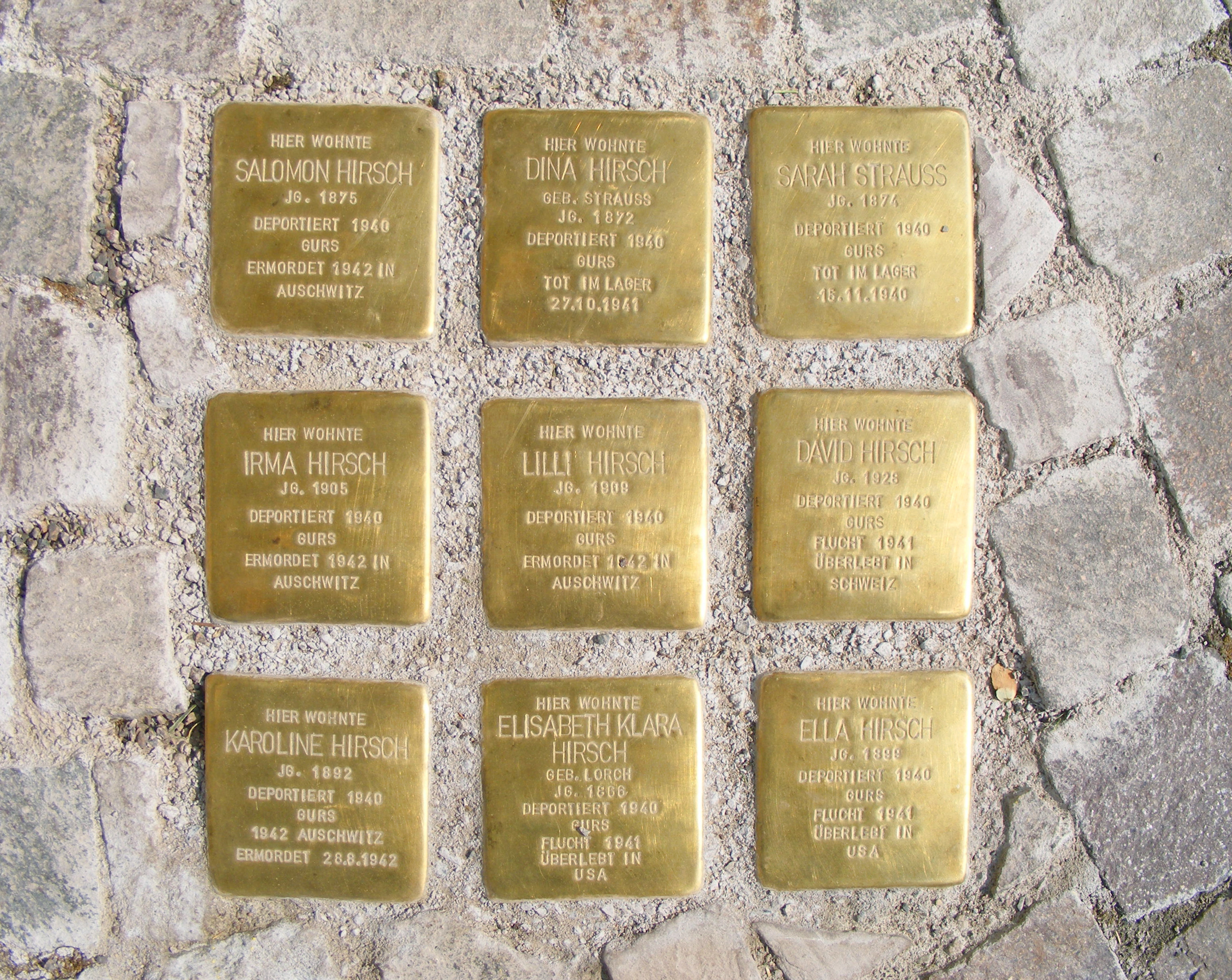 Am 27. März 2009 verlegte Stolpersteine für die neun im Jahre 1940 deportierten Dirmsteiner Juden: Salomon Hirsch (siehe Gedenkbuch des Bundesarchivs [1]), Dina Hirsch (siehe Gedenkbuch des Bundesarchivs [2]), Sara Strauss (siehe Gedenkbuch des Bundesarchivs [3]), Irma Hirsch (siehe Gedenkbuch des Bundesarchivs [4]), Lilli Hirsch (siehe Gedenkbuch des Bundesarchivs [5]), David Hirsch, Karoline Hirsch (siehe Gedenkbuch des Bundesarchivs [6]), Elisabeth Klara Hirsch, Ella Hirsch